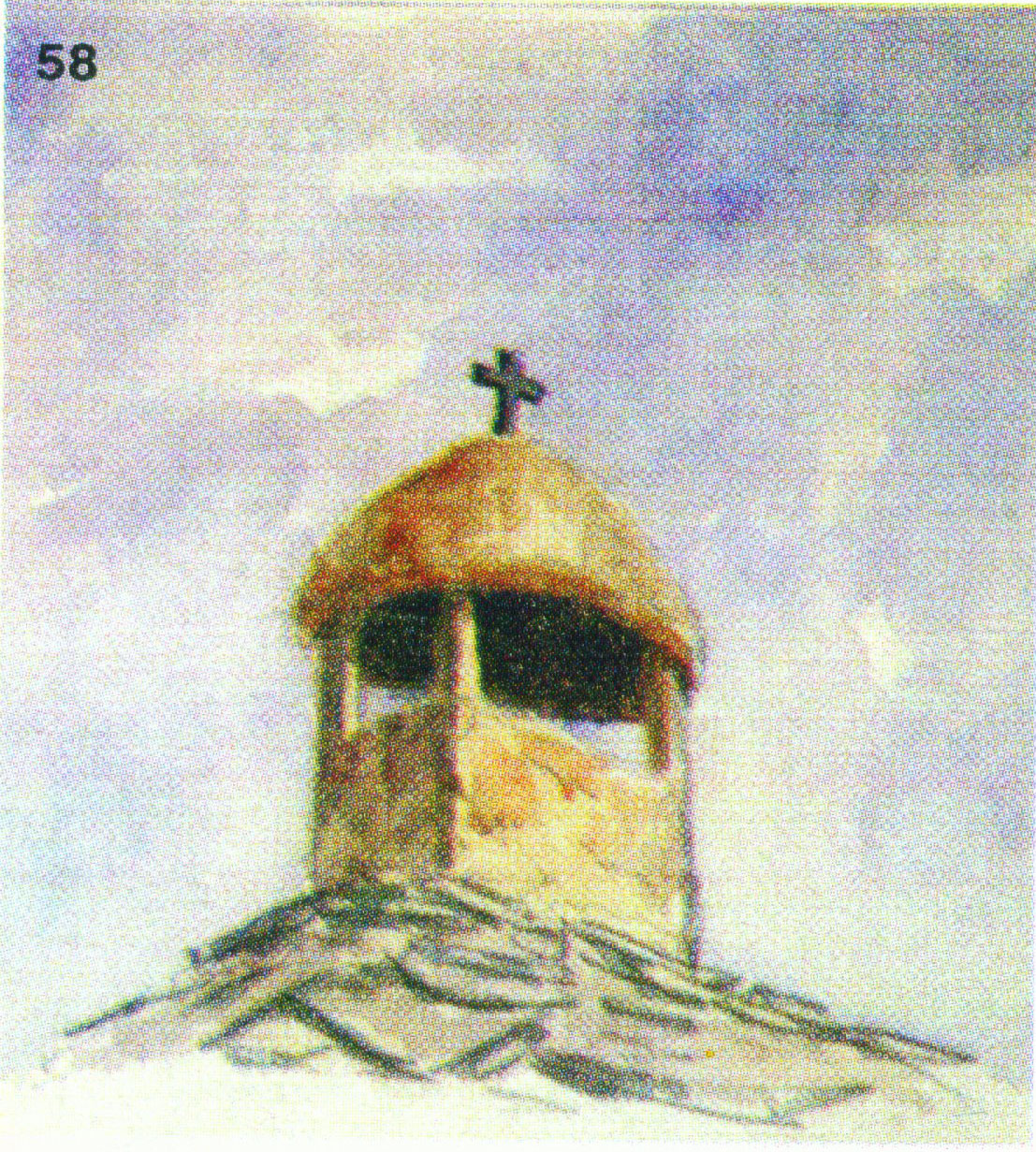 58. Комин с кръст от желязо на старата къща на Трифон Милов в с. Лютиброд, Врачанско. Прибли­зителни размери на кръстчето: 35x20x2 см. Скициран през юни 1916 г. (Т. 2, обр. 124.)